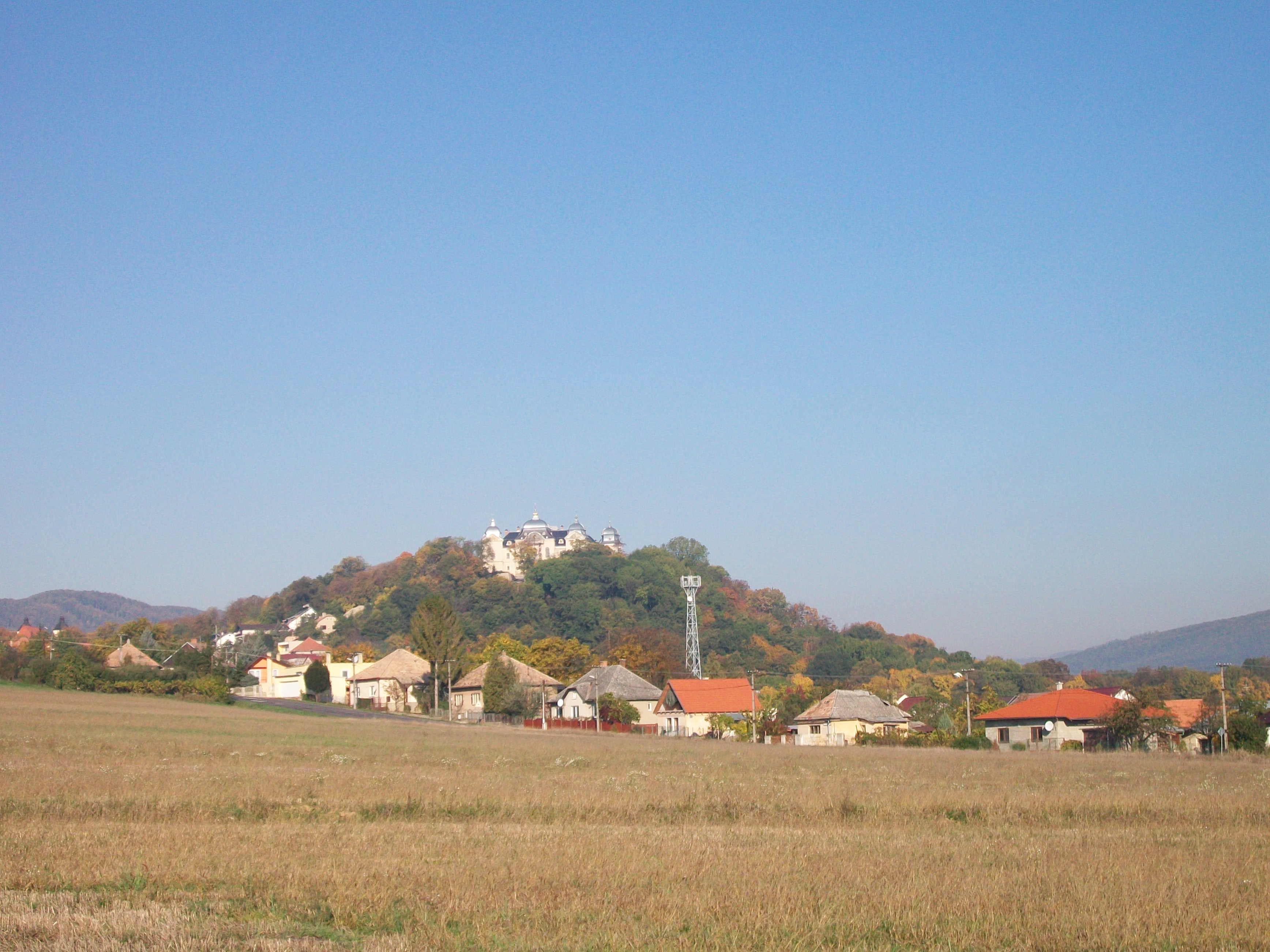 Obec Halič v okrese Lučenec